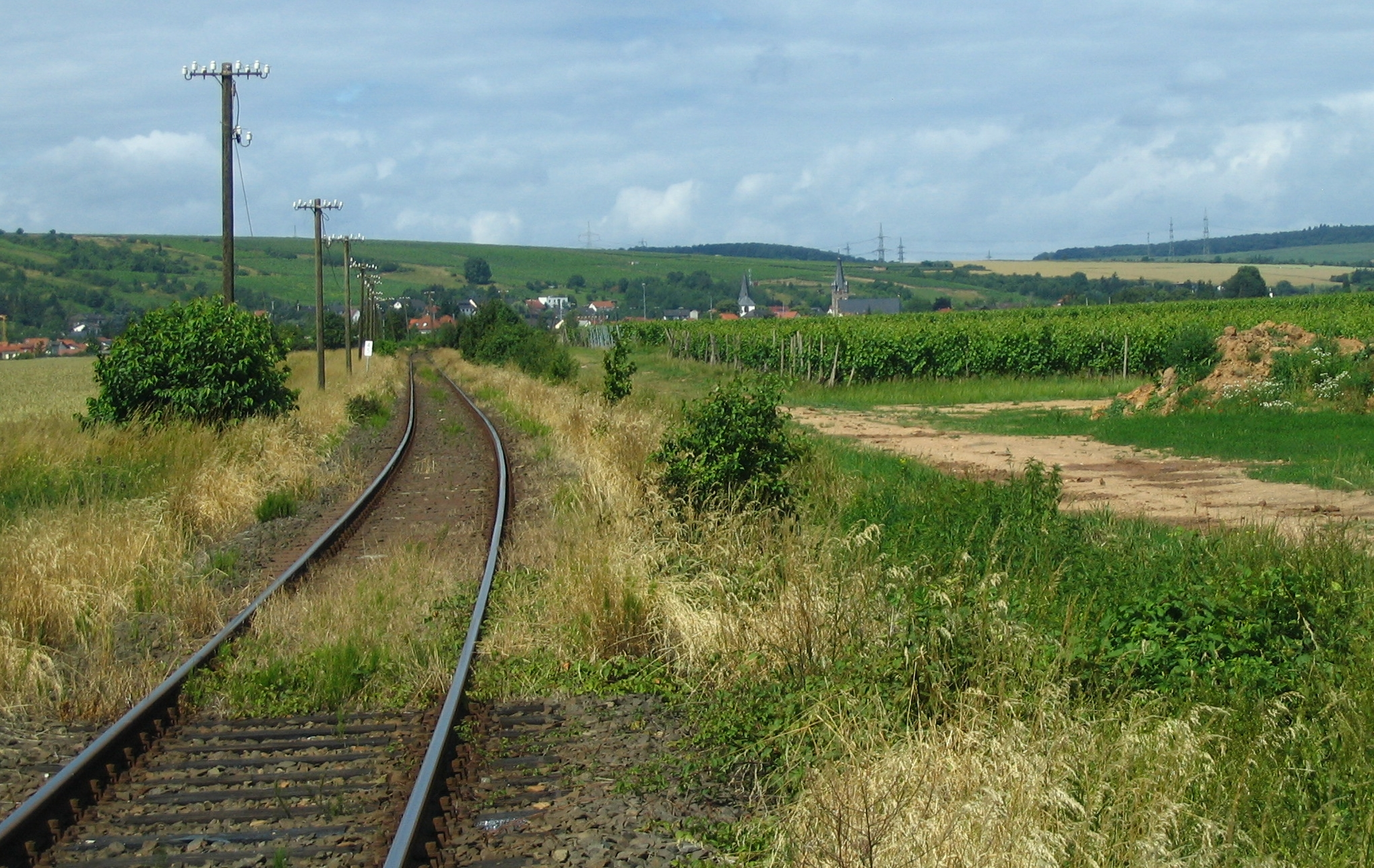 Stillgelegte Hunsrückbahn bei Guldental